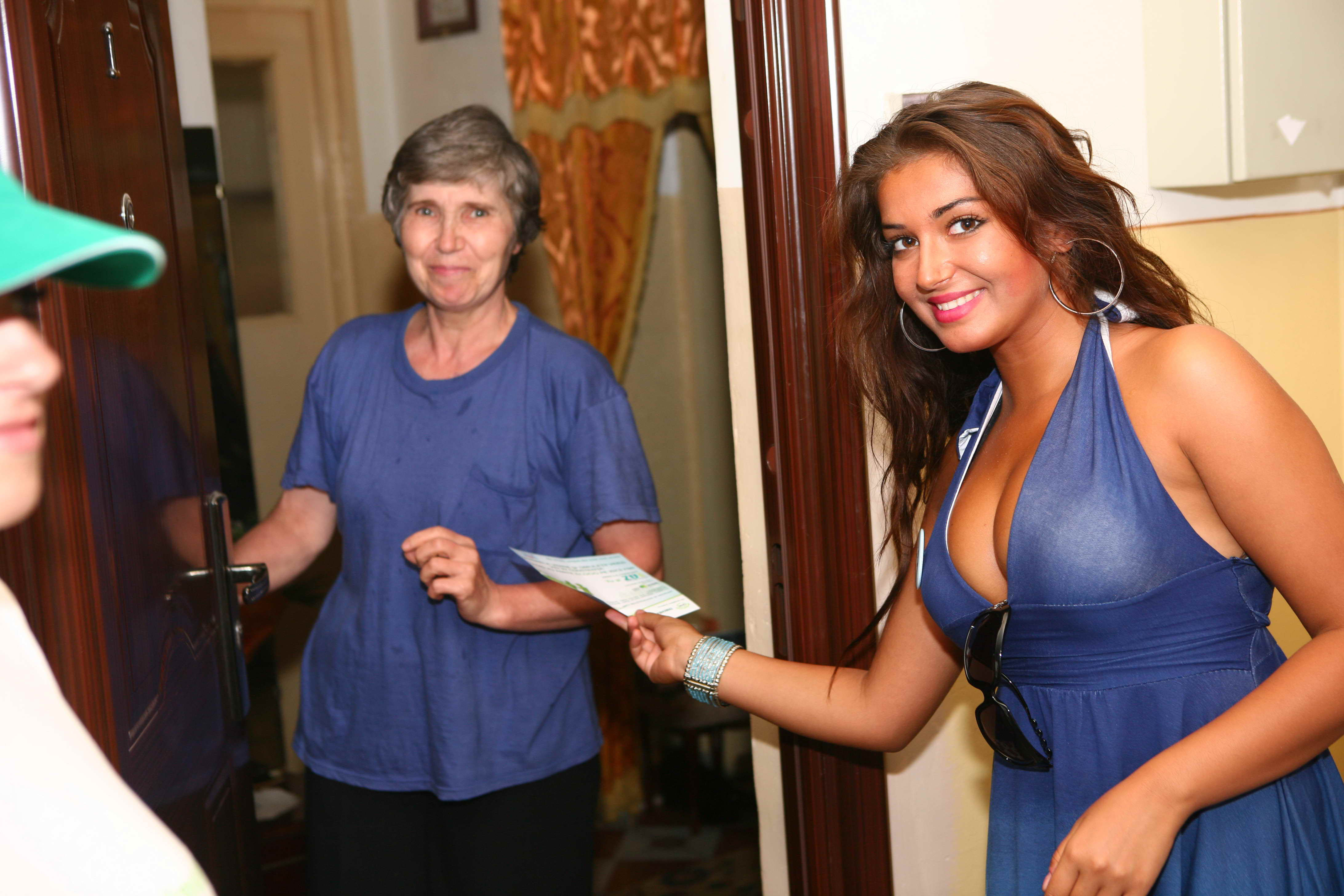 La cantante Elena Ionescu de Mandinga en un acto solidario en Constanza.